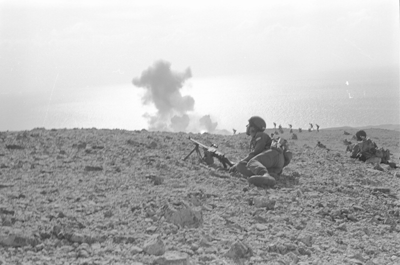 פשיטה לשדואן. שיטת חטיבת צנחנים 35 על האי שדואן במפרץ סואץ. חוליית פיקוד קדמית של אחד הכוחות. מבצע רודוס..